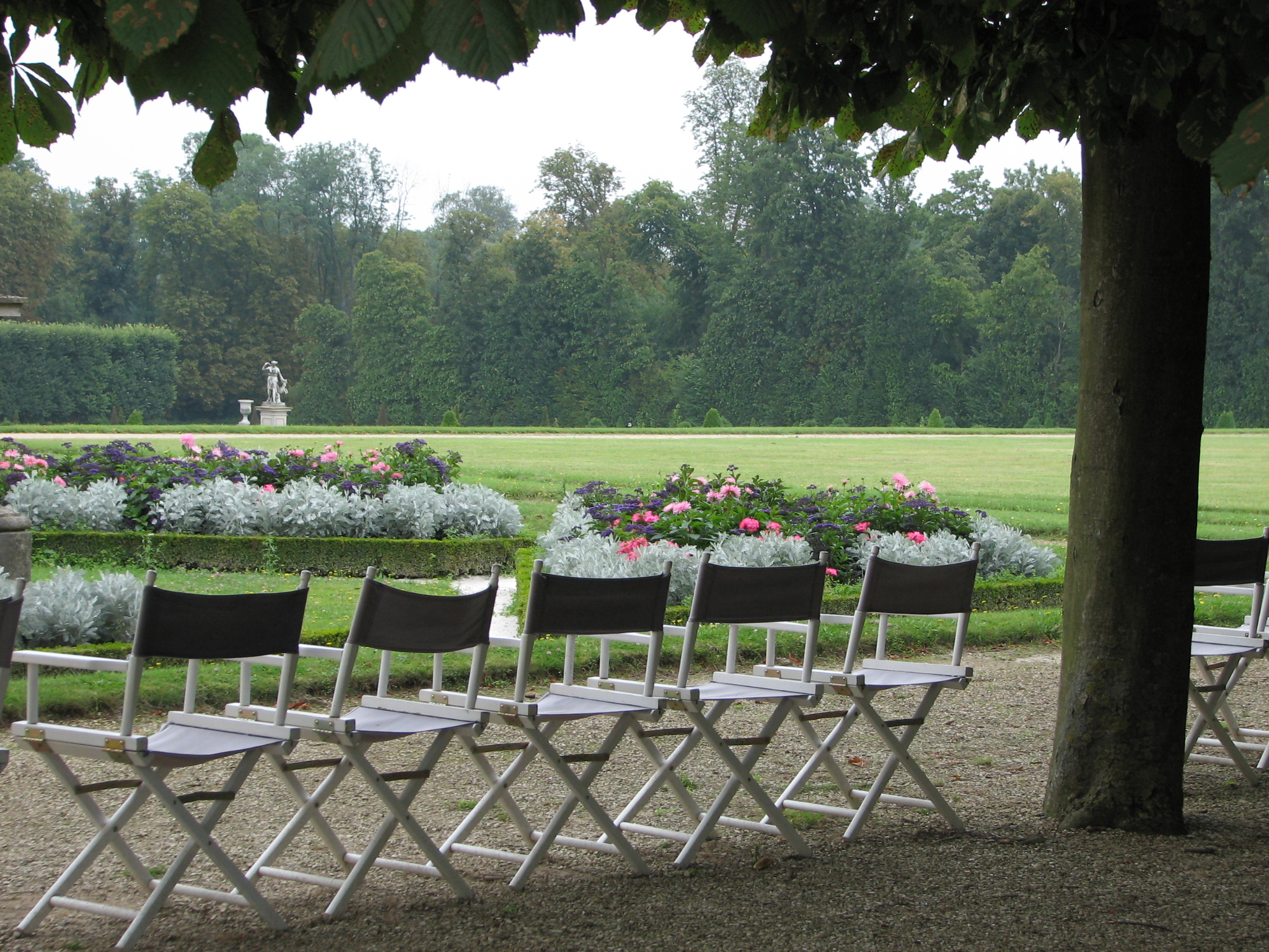 Le parc du château de Champs-sur-Marne en Seine-et-Marne en France.